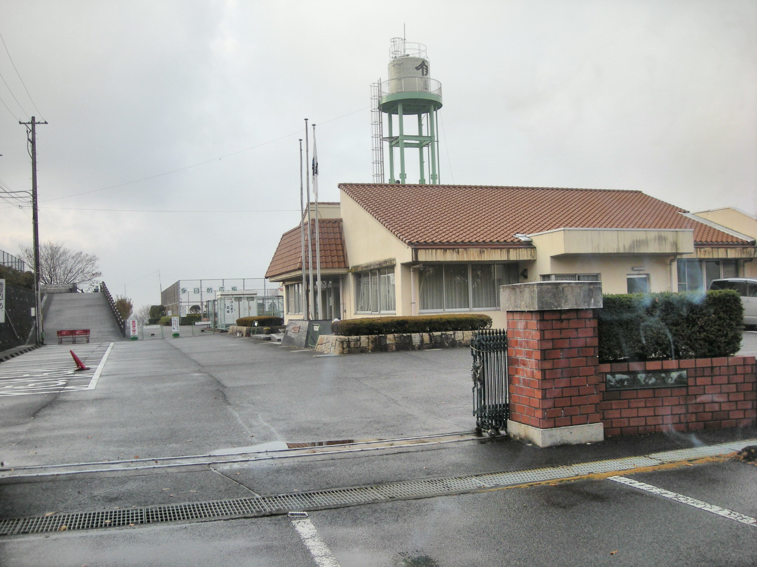 iginomori（伊木の森）